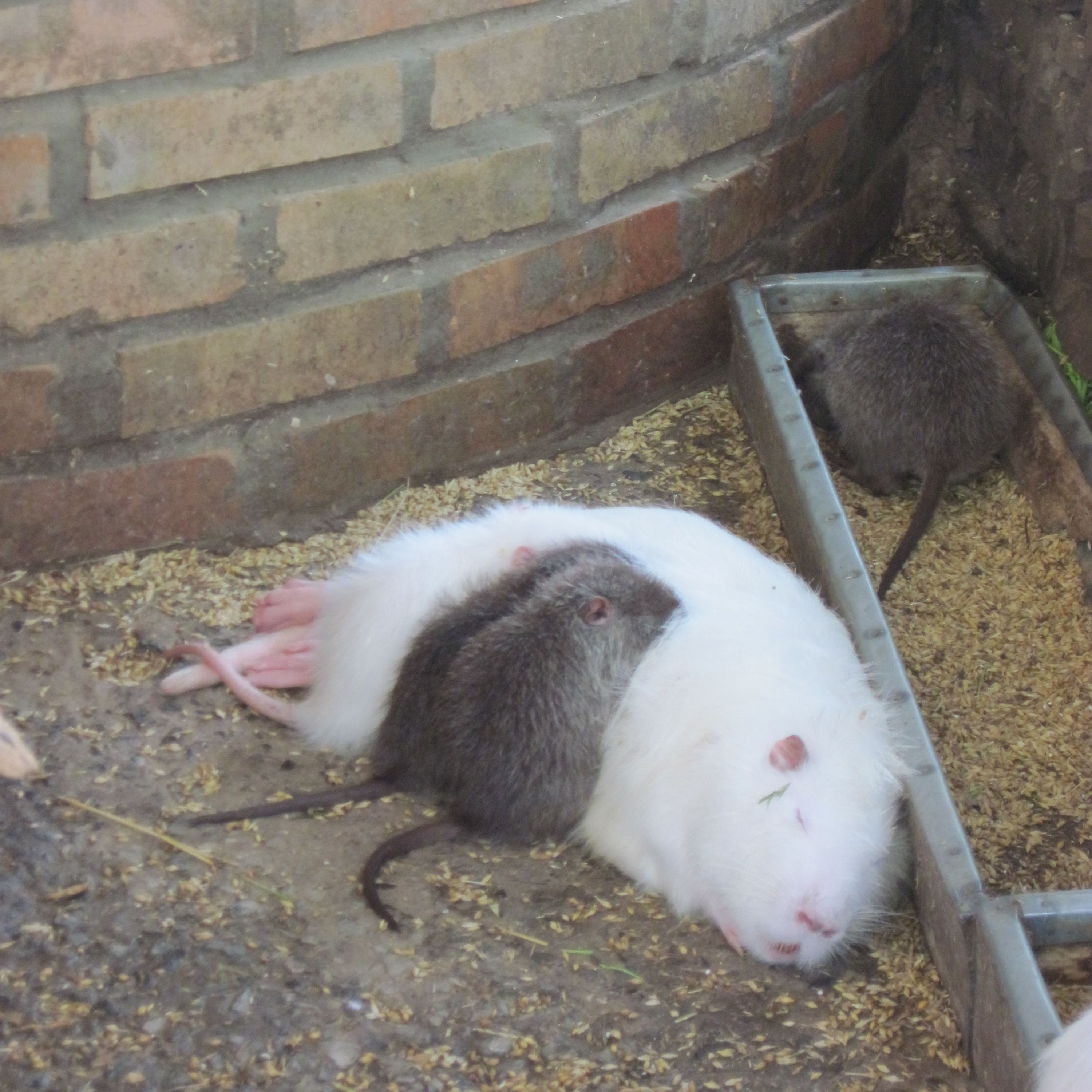 живой уголок, вольер